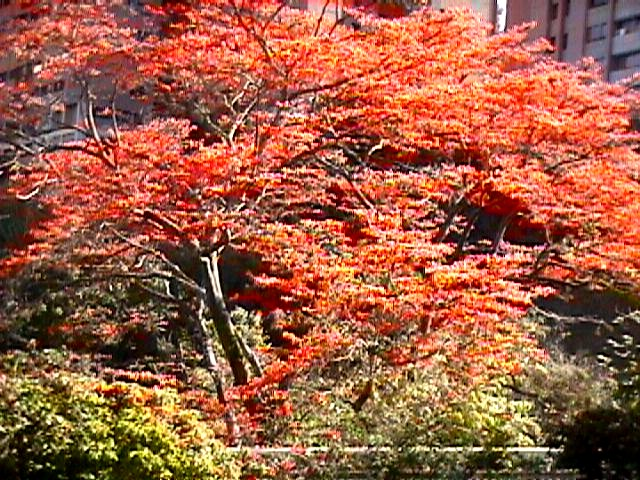 Intercomunal Baruta - El Hatillo, estado Miranda - Venezuela (2006)